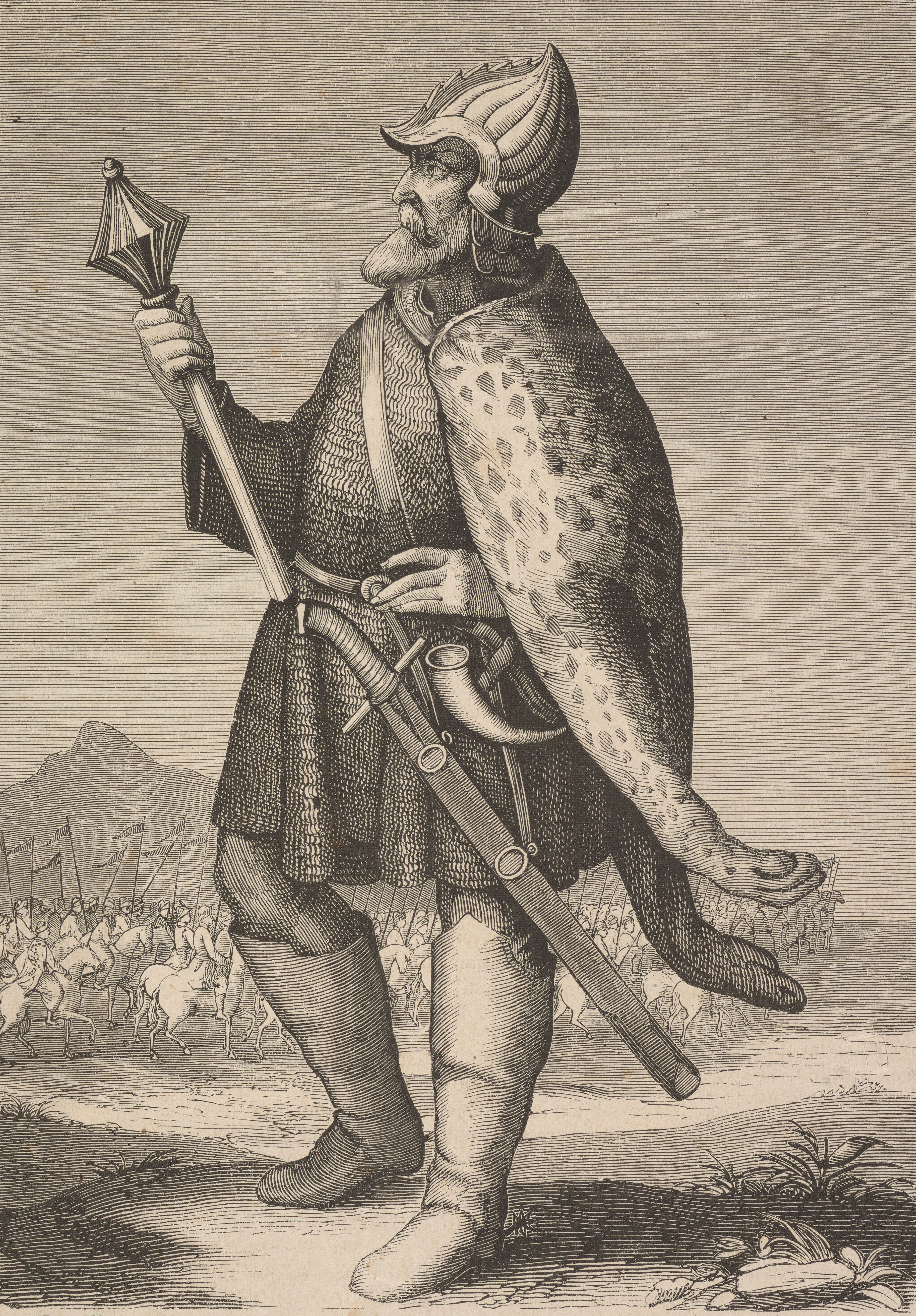 Jan Žižka z Kalichu